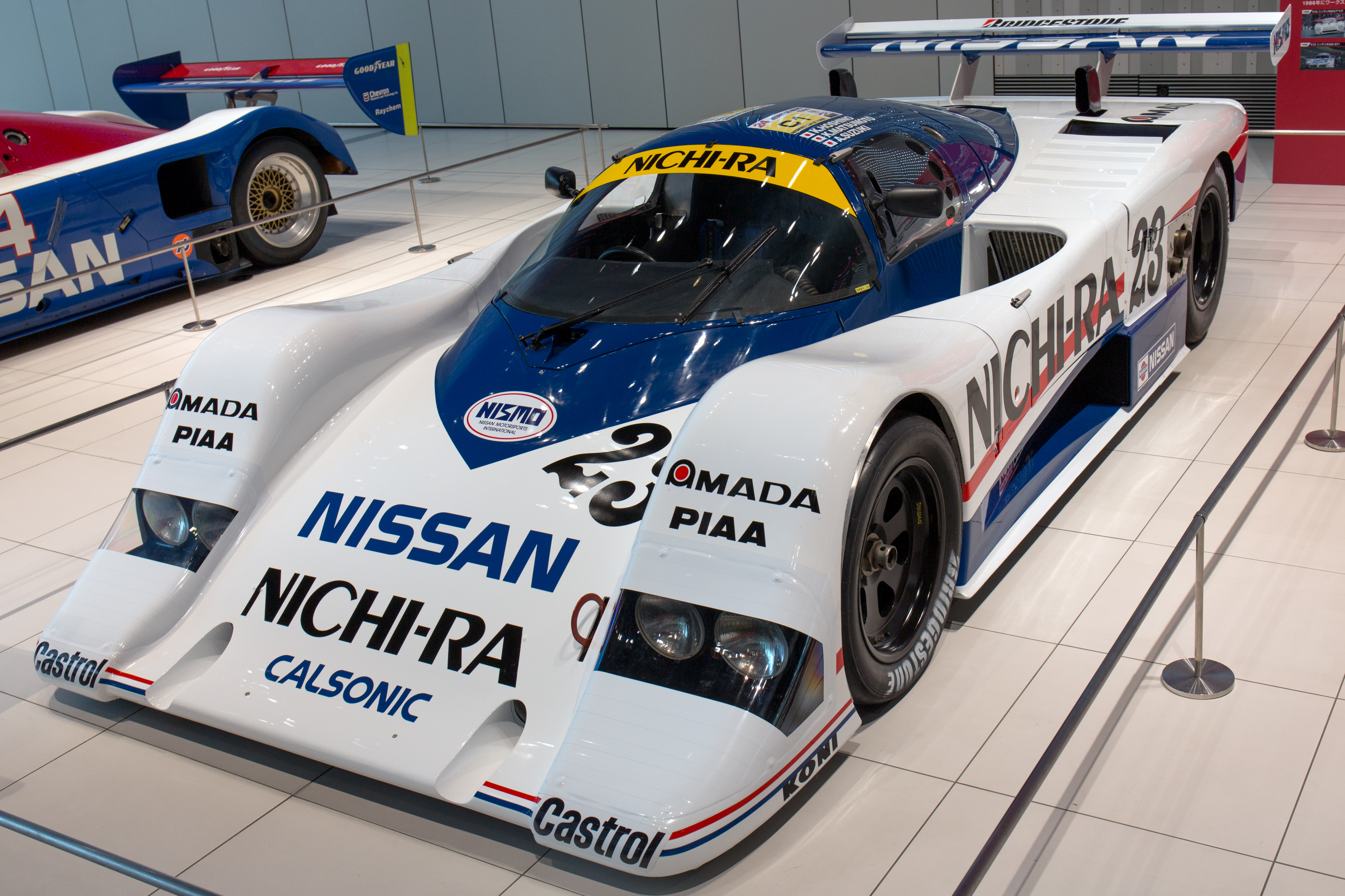 1986 Nissan R86V